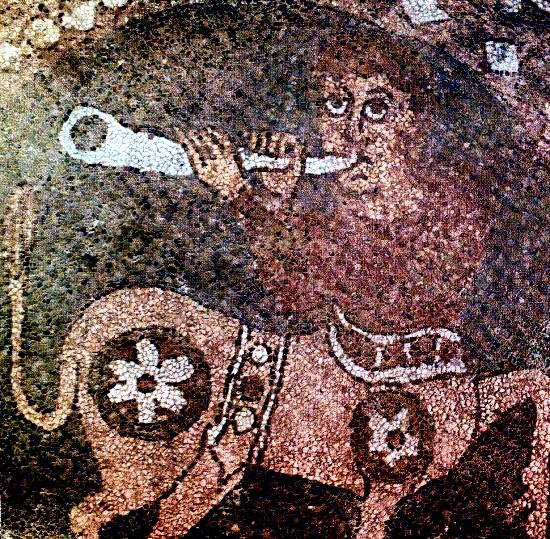 Desciption: Particolare del mosaico di San Cataldo Photographer: --Beren85